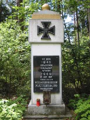 Am 7.April 1945 musste das SS-Panzergrendier Ersatz- und Ausbildungsbataillon das Pinkatal nördlich von Oberwart in westlicher Richtung überqueren. Danach stieß es weiter in Richtung Lafnitztal vor. Im Gebiet von Buchschachen kämpfte es einige feindliche Stellungen nieder, bevor es am 8. April die deutschen Linien im Lafnitztal erreichte.